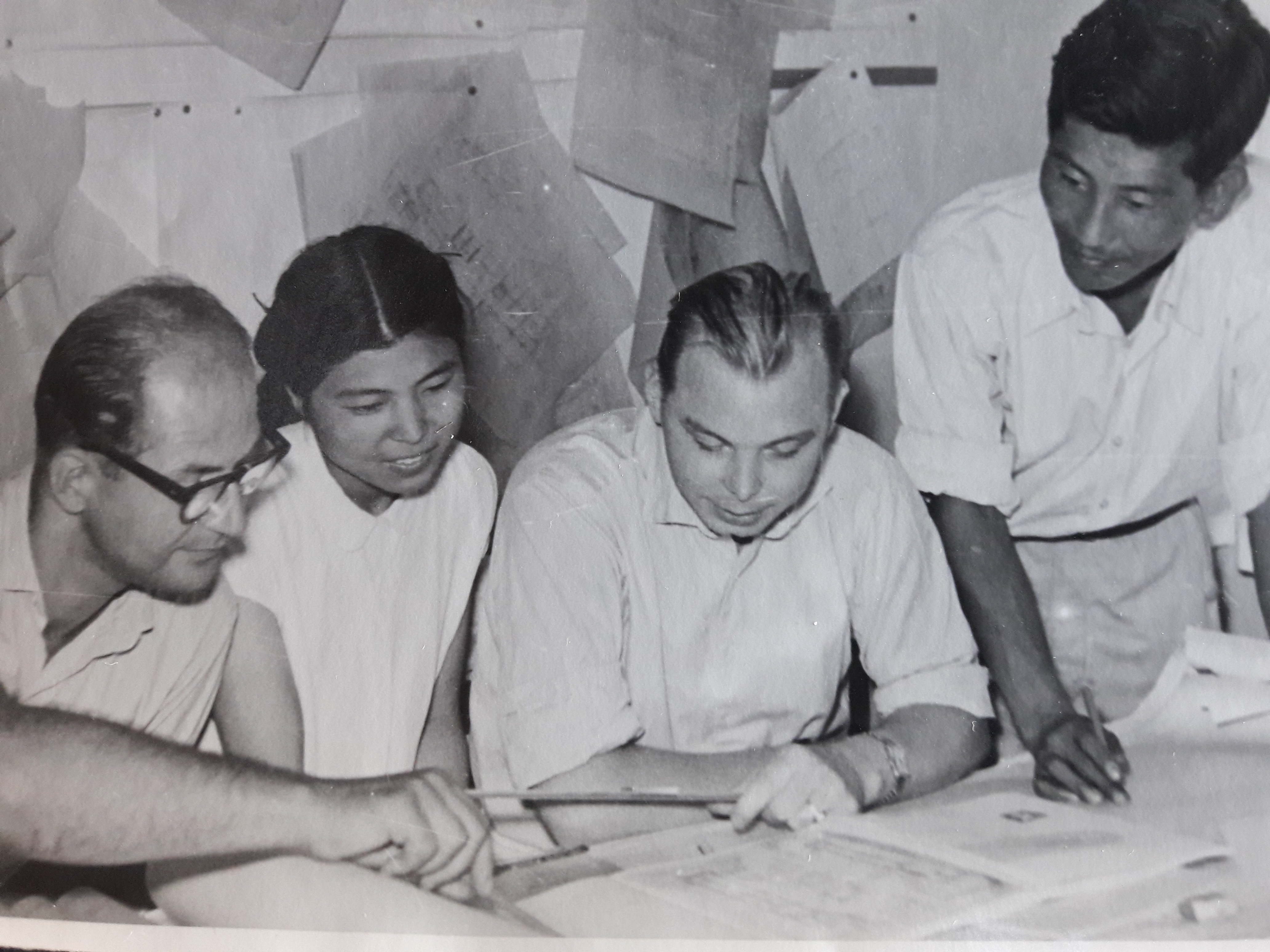 wir arbeiten am Projekt "TBC-Krankenhaus"; von links: Werner ZInder; NN/koreanische Dolmetscherin, genant: "Christel"; Matthias Schubert, Tse...